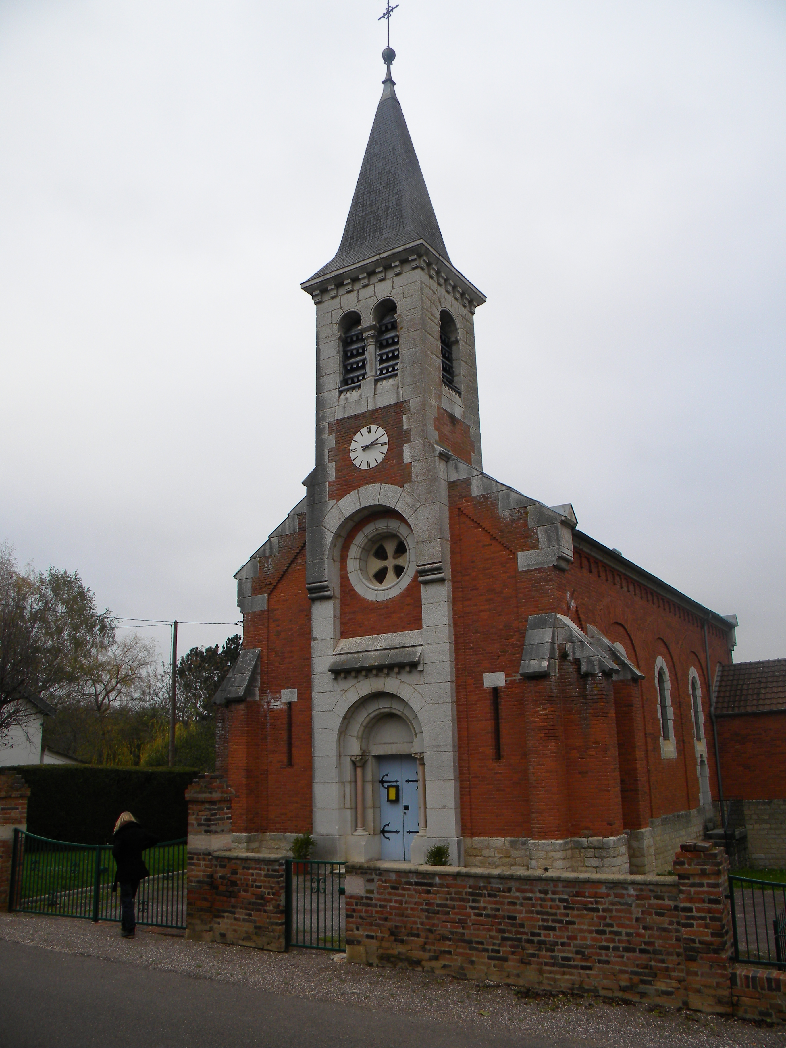 Preĝejo Saint-Marcel